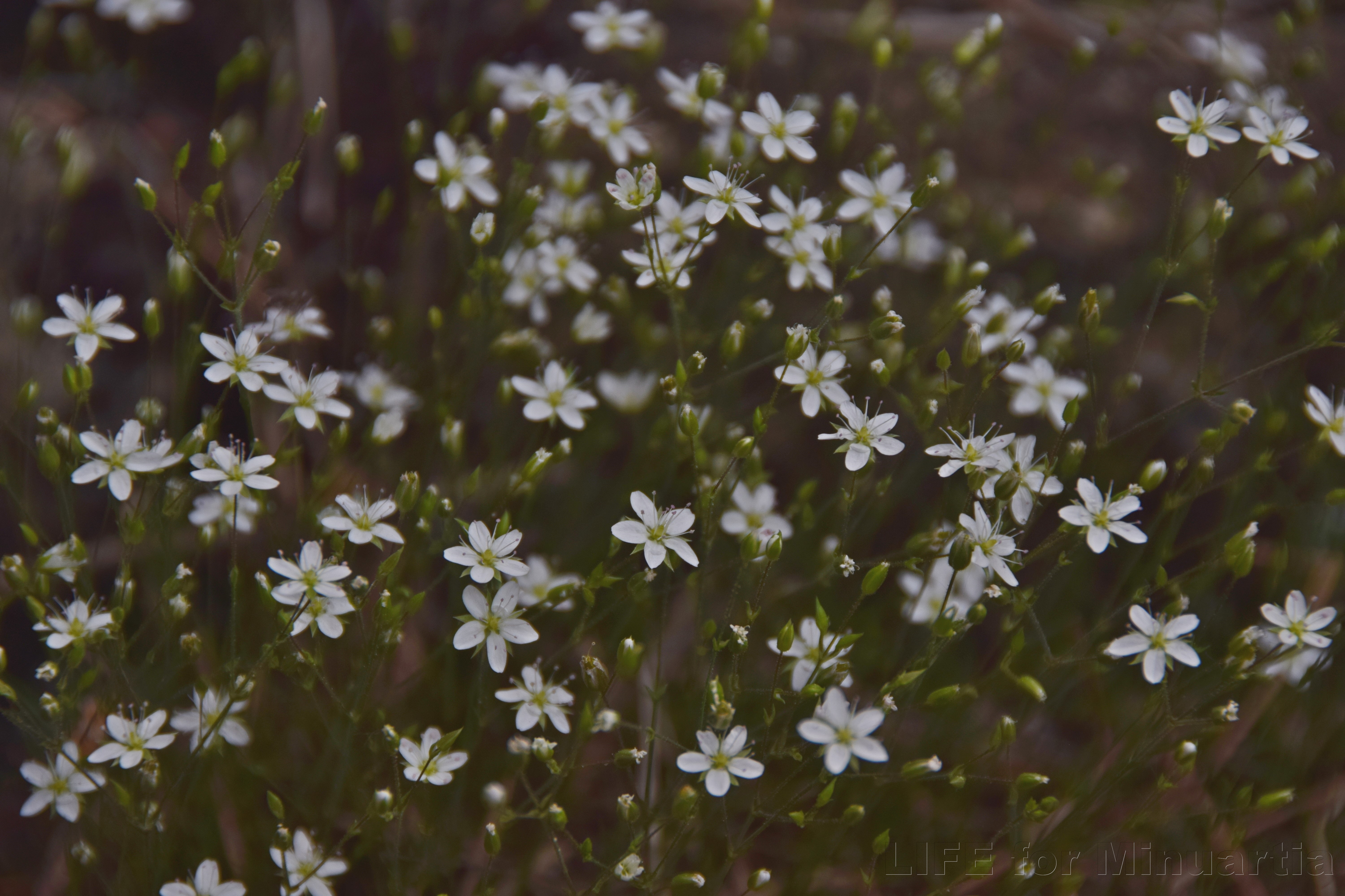 Kuřička hadcová (Minuartia smejkalii)